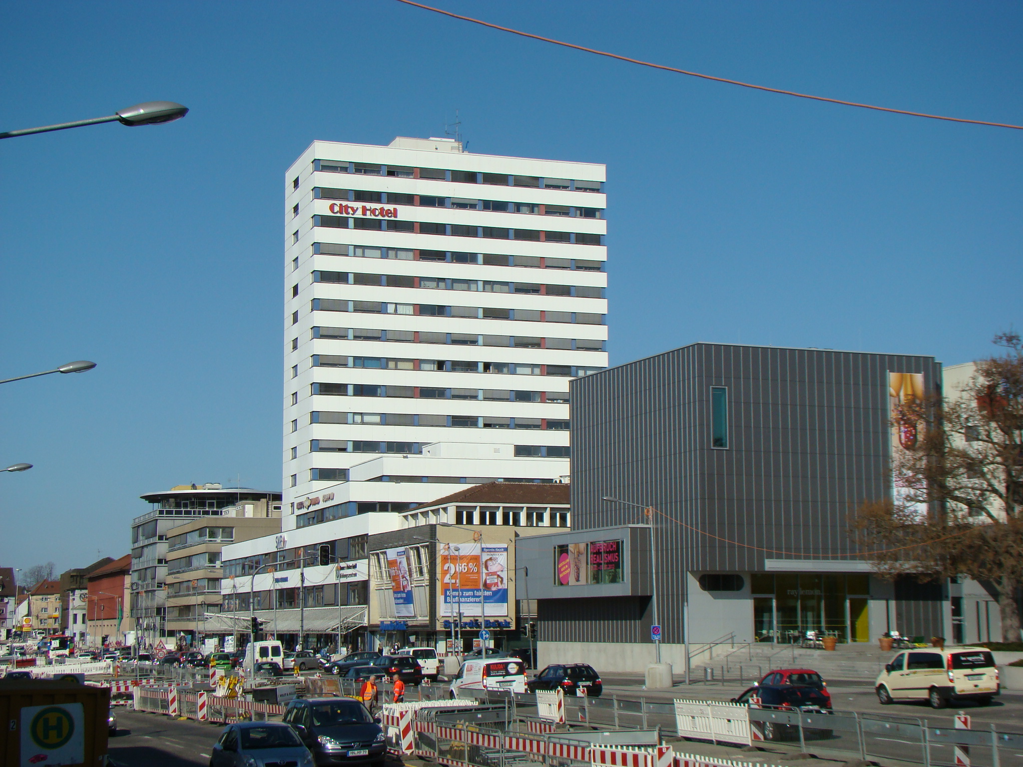 Allee in Heilbronn, 26. März 2012. Rechts im Vordergrund: Kunsthalle Vogelmann, dahinter Shopping-Hochhaus. Bauarbeiten auf der Straße zum Ausbau der Stadtbahn Heilbronn.